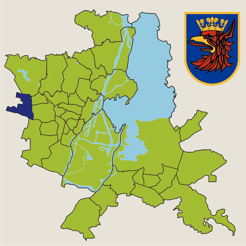 Osiedle "Krzekowo-Bezrzecze" w Szczecinie – jednostka pomocnicza miasta w 2010